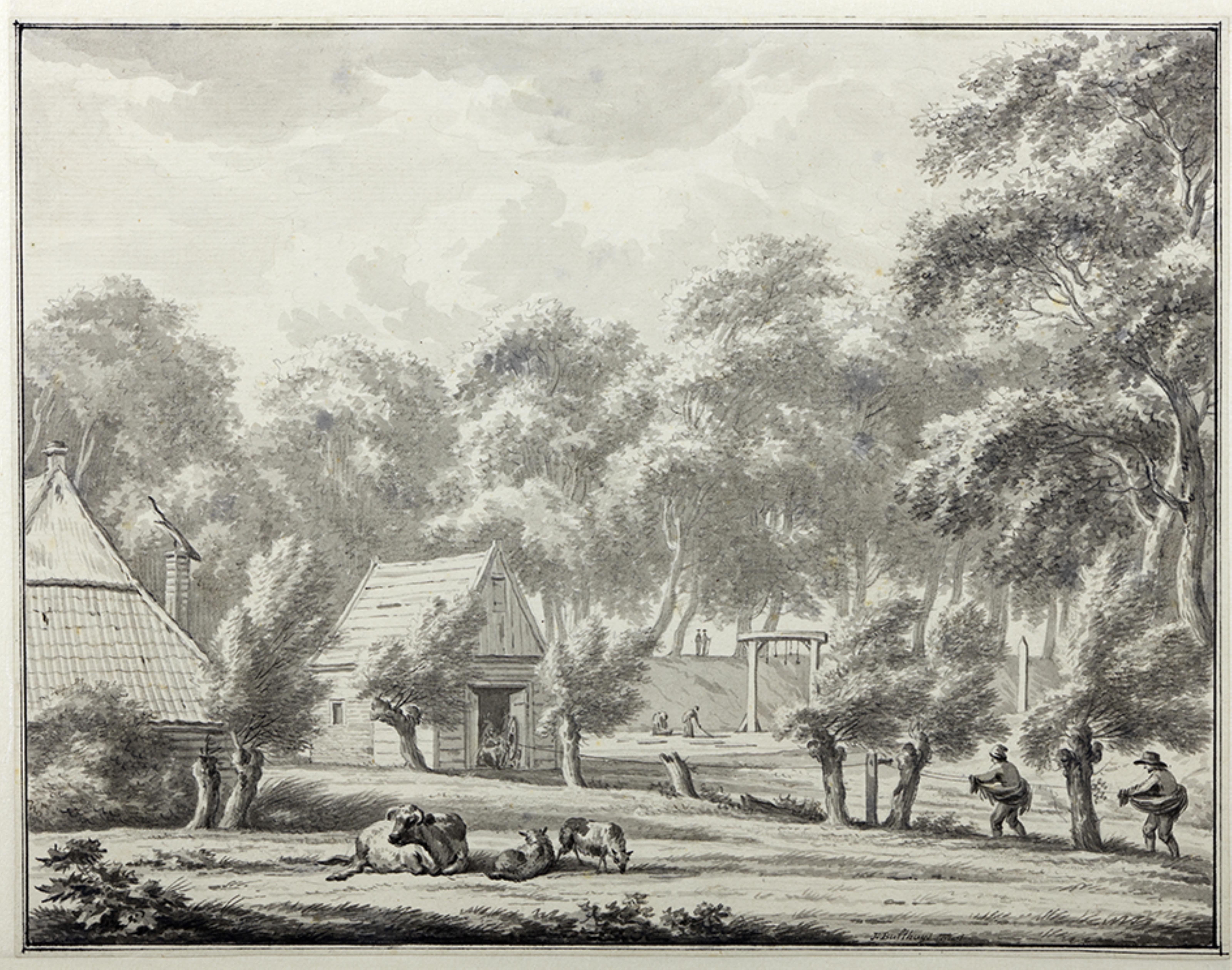 Jacobijner- of Galgendwinger met lijnbaan en militaire gerechtsplaats. "Een gedeelte der Stadswallen, ziende op de Myliterre gerichtsplaats in Groningen, zoals zij zich vertoonde in den Jaare 1772"